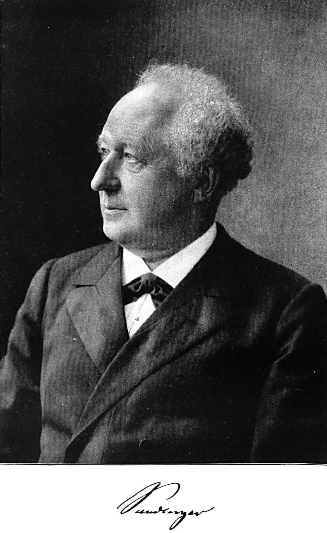 Viktor von Sandberger, Porträt.